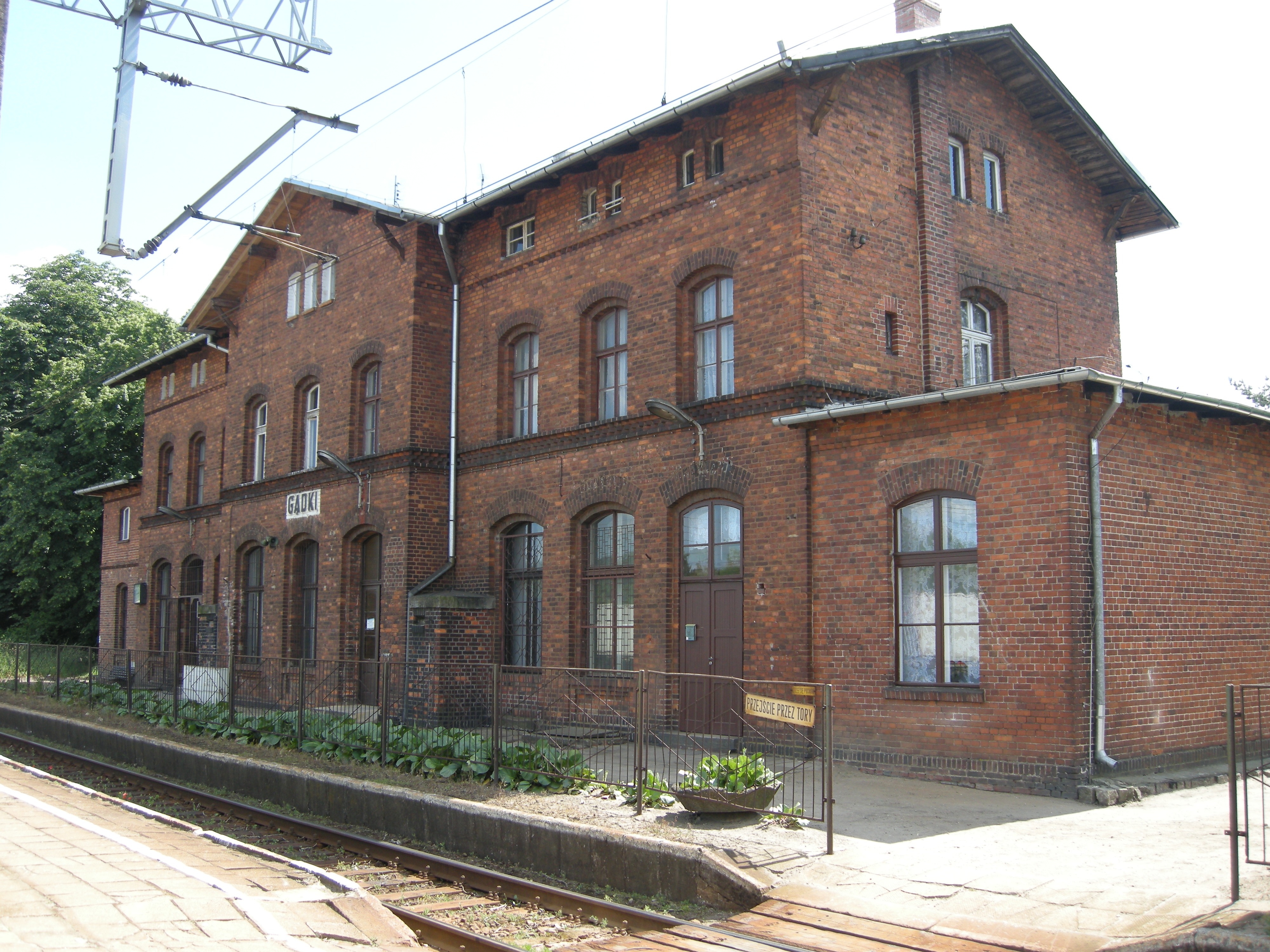 Dworzec PKP Gądki. Polska.